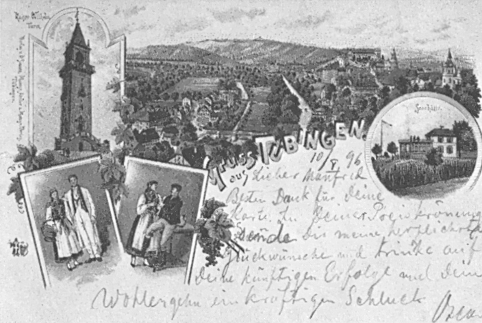 Postkarte "Gruß aus Tübingen": Kaiser-Wilhelm-Turm, zwei Paare in Trachten, die Gaststätte Sennhüte und Blick von der Sennhütte aus auf Tübingen (Farblithographie nach Fotografie)